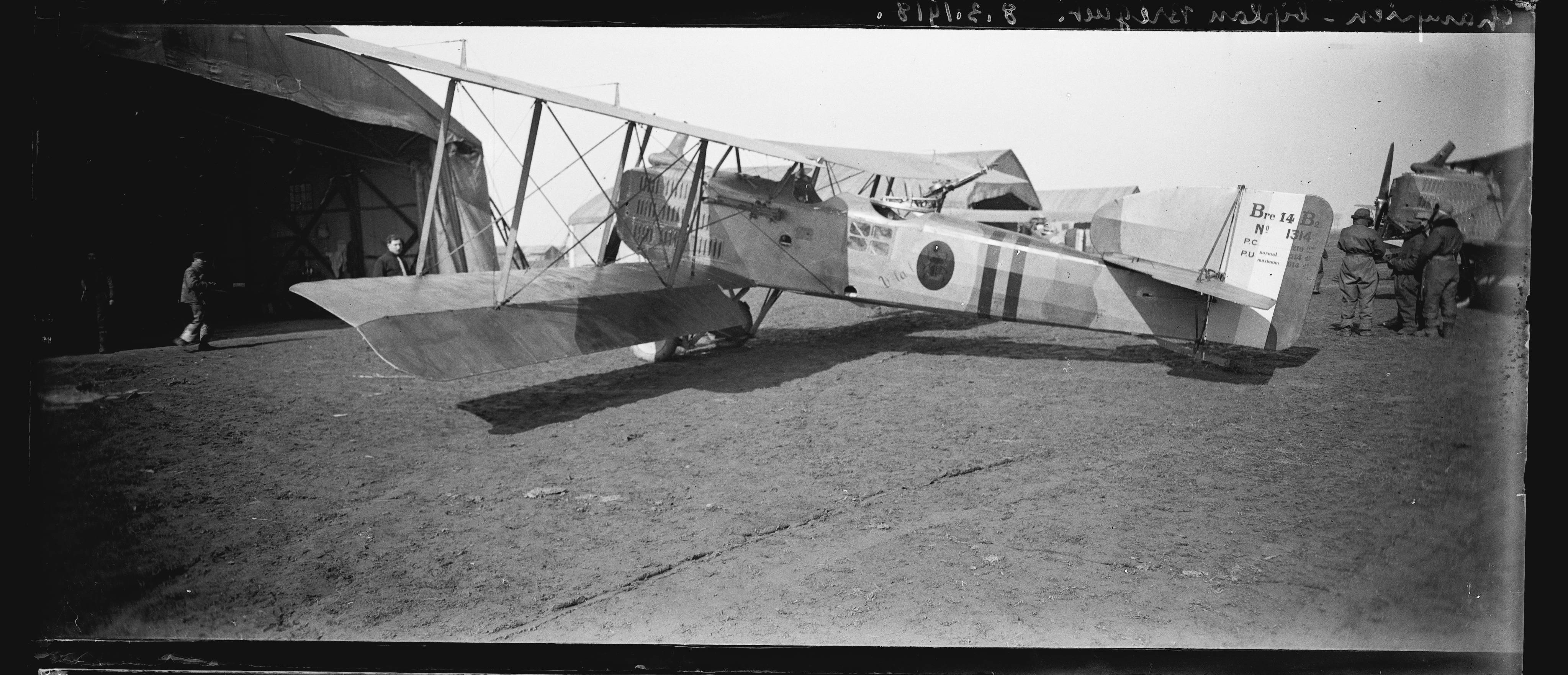 Vue d'ensemble d'un avion biplan Bréguet à Champien (Somme). 8 mars 1918. Guerre 1914-1918.